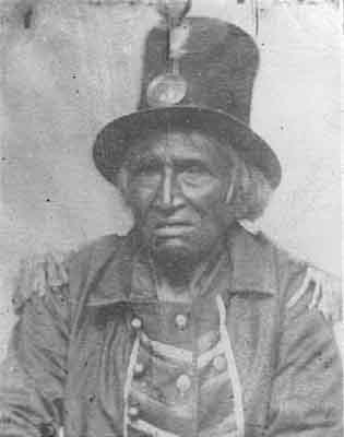 Chief Tamaha.